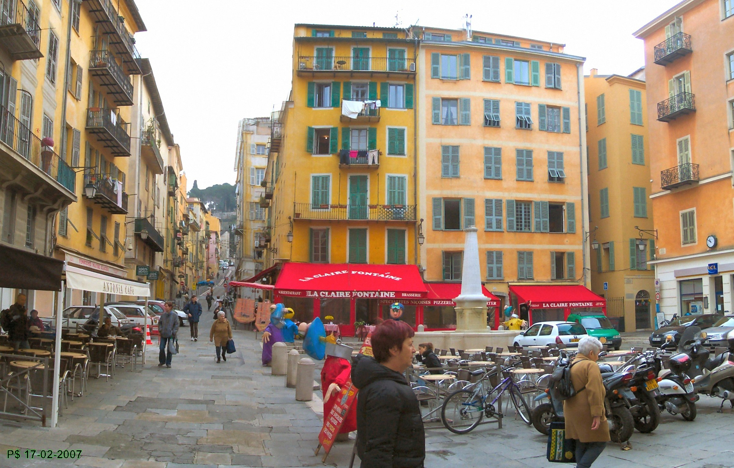 Place Rossetti. Au fond, la colline du château.